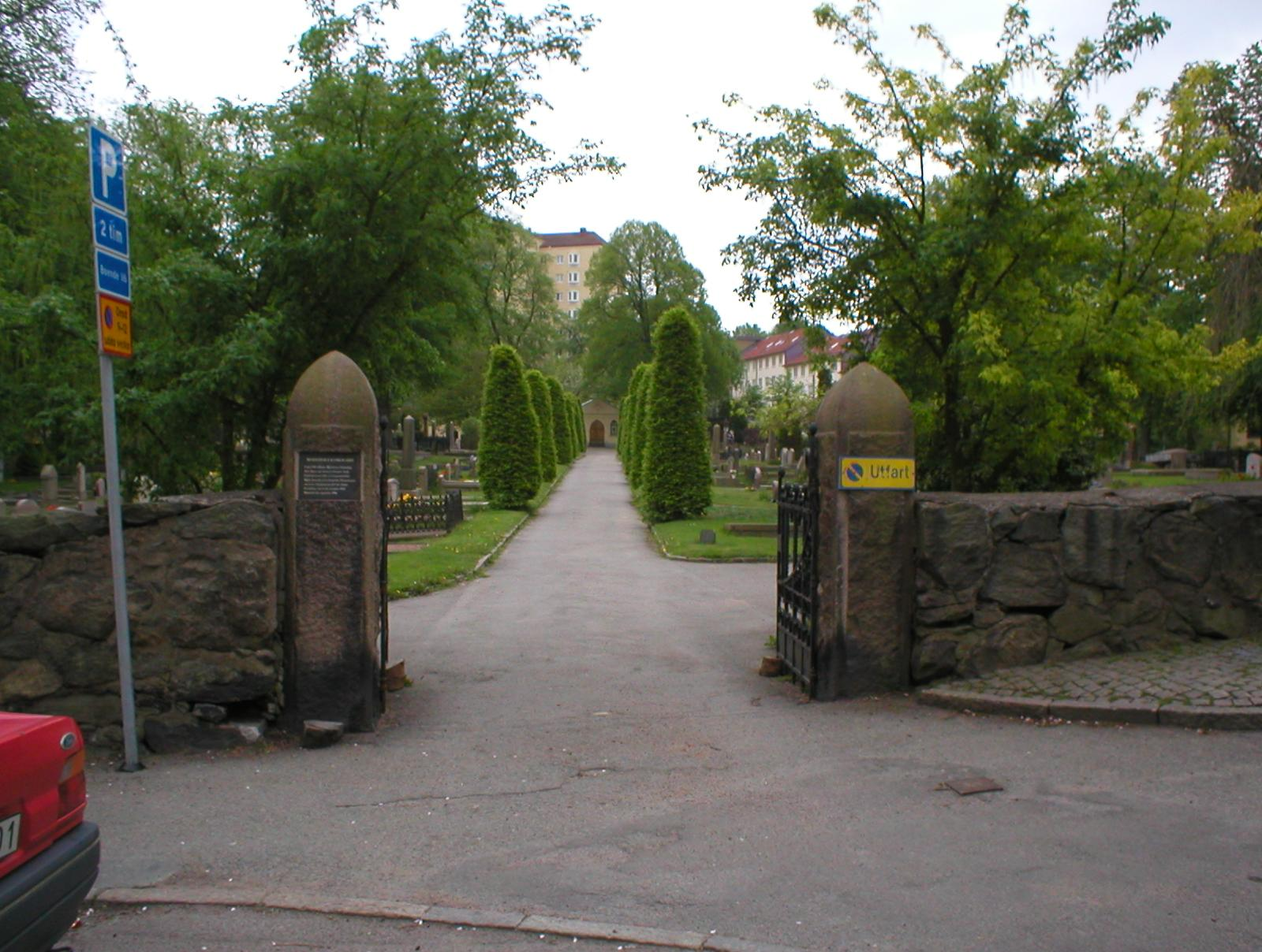 Foto av Mariebergskyrkogården, Majorna, Göteborg.